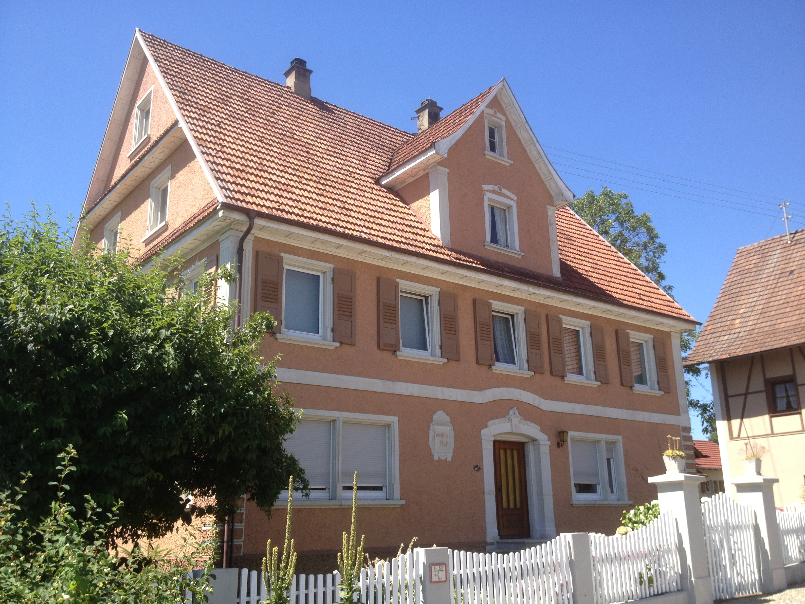 Deutschland - Baden-Württemberg - Bodenseekreis - Friedrichshafen - Ailingen: Wolfenhof